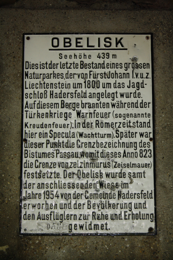 Beschreibung des Obelisk in der Ortschaft Hadersfeld, Marktgemeinde St. Andrä-Wördern